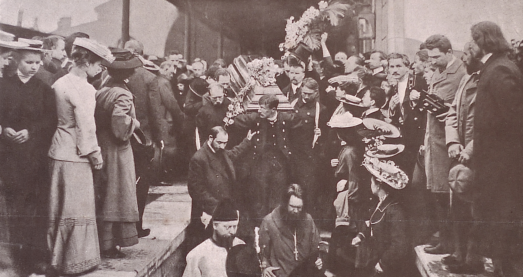 На Николаевском вокзале. Вынос из вагона гроба с телом А.П. Чехова